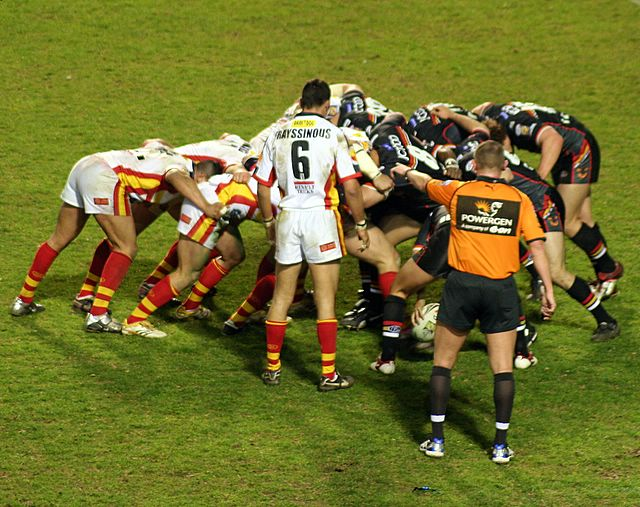 Dragons Catalans-Bradford Bulls à Perpignan